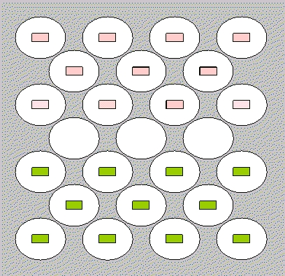 Lasca (juego-(tablero_y_fichas)(Board games)